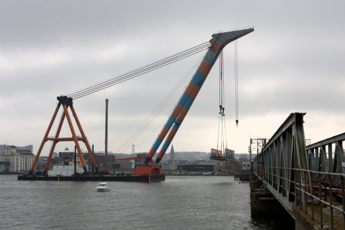 D. 21.4.2012 blev den kontravægt og beskadigede broklap fjernet. Her fjernes broklappen af flydekranen Samson.